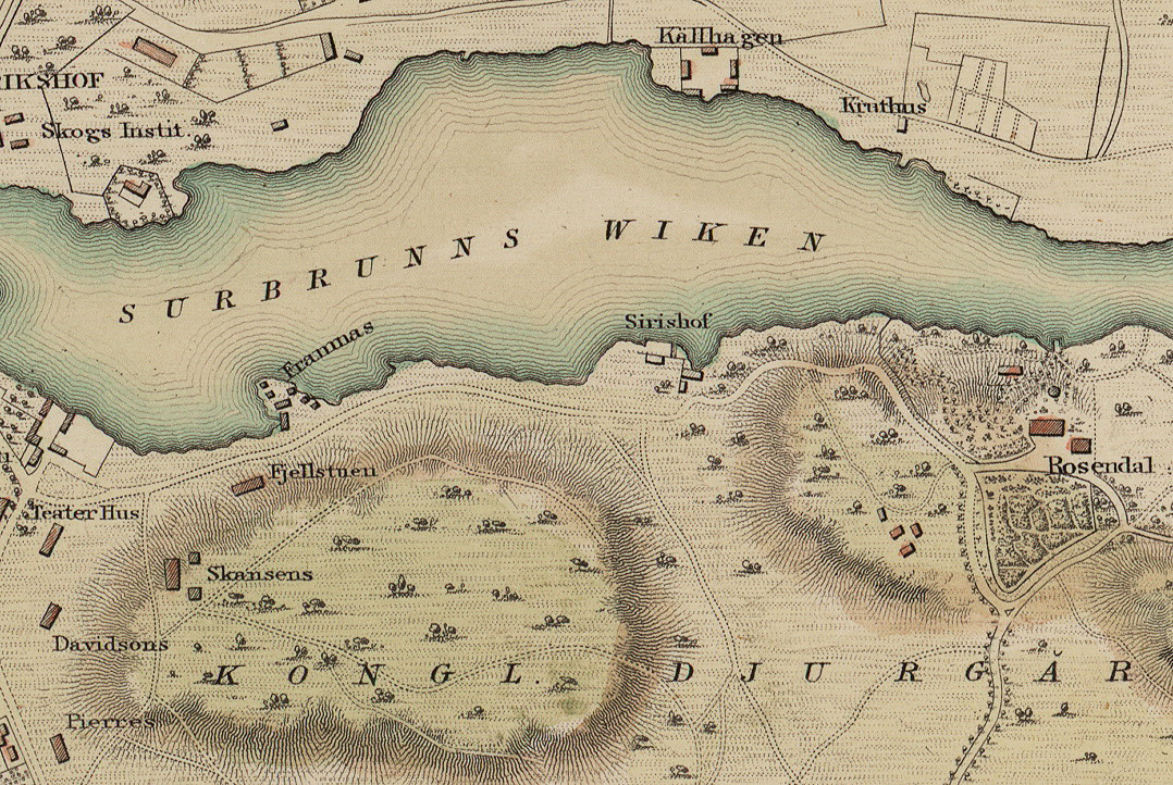 Del av Stockholmskartan från 1838 visande en del av SÖDRA dJURGÅRDEN